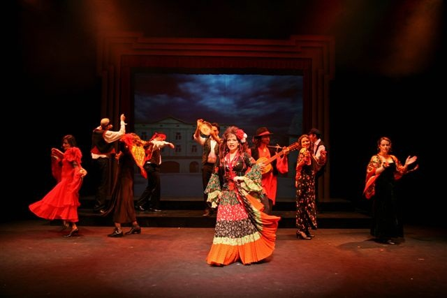 מוניקה ורדימון בתפקיד הצועניה בהצגה מסעות בנימין השלישי מחזה מוזיקלי מאת מנדלי מוכר ספרים בתיאטרון יידישפיל